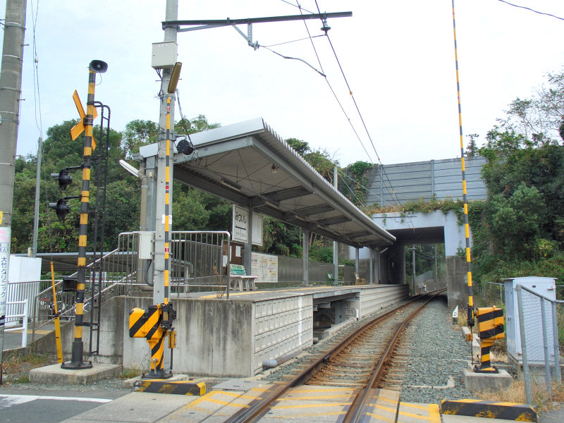 熊本電気鉄道三ツ石駅 トンネル上部は九州自動車道 奥が御代志駅方面、手前が北熊本駅方面。 撮影者/著者/著作権保有者 : MK Products (本人がアップロード) 撮影日 : 2006/09/24 三ツ石駅用にアップロードした画像です。良い画像があれば別の画像に変えてください。